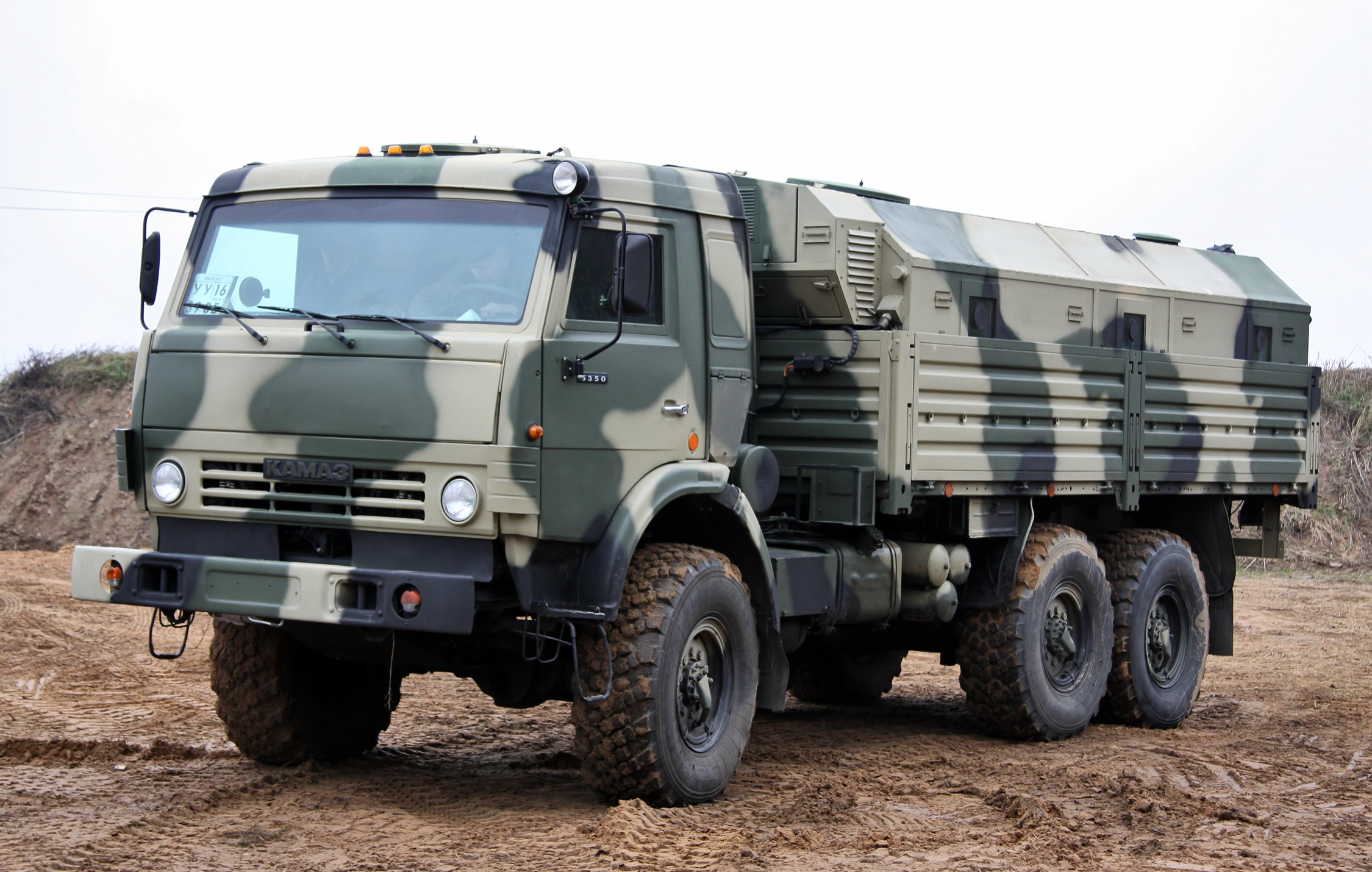 ЛДС-79271 и бронированный КАМАЗ-5350 с защищенным многофункциональным модулем (LDS-79271 and armored KAMAZ-5350 with multi-functional armored module)